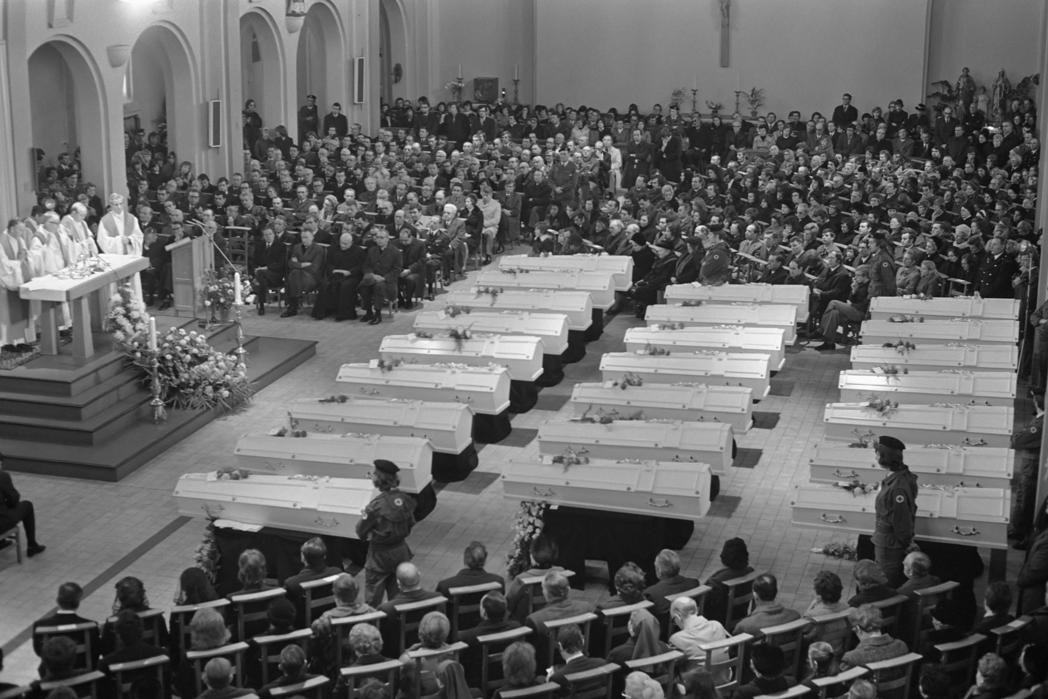 Een brand in het Heilig-Hartcollege in Heusden, waarbij 23 doden te betreuren waren. Overzicht van de rouwdienst met de kisten van de slachtoffers 26 januari 1974